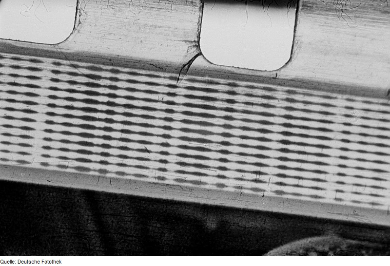 Original image description from the Deutsche FotothekMakroaufnahme eines Einzelbildes eines Tonfilms